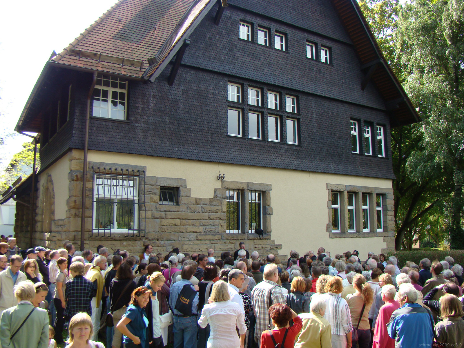 Großer Andrang bei der Villa Pielenz in Heilbronn zum Tag des offenen Denkmals 2009, Vortrag von Dr. Joachim Hennze zur architekturgeschichtlichen Bedeutung des Bauwerks